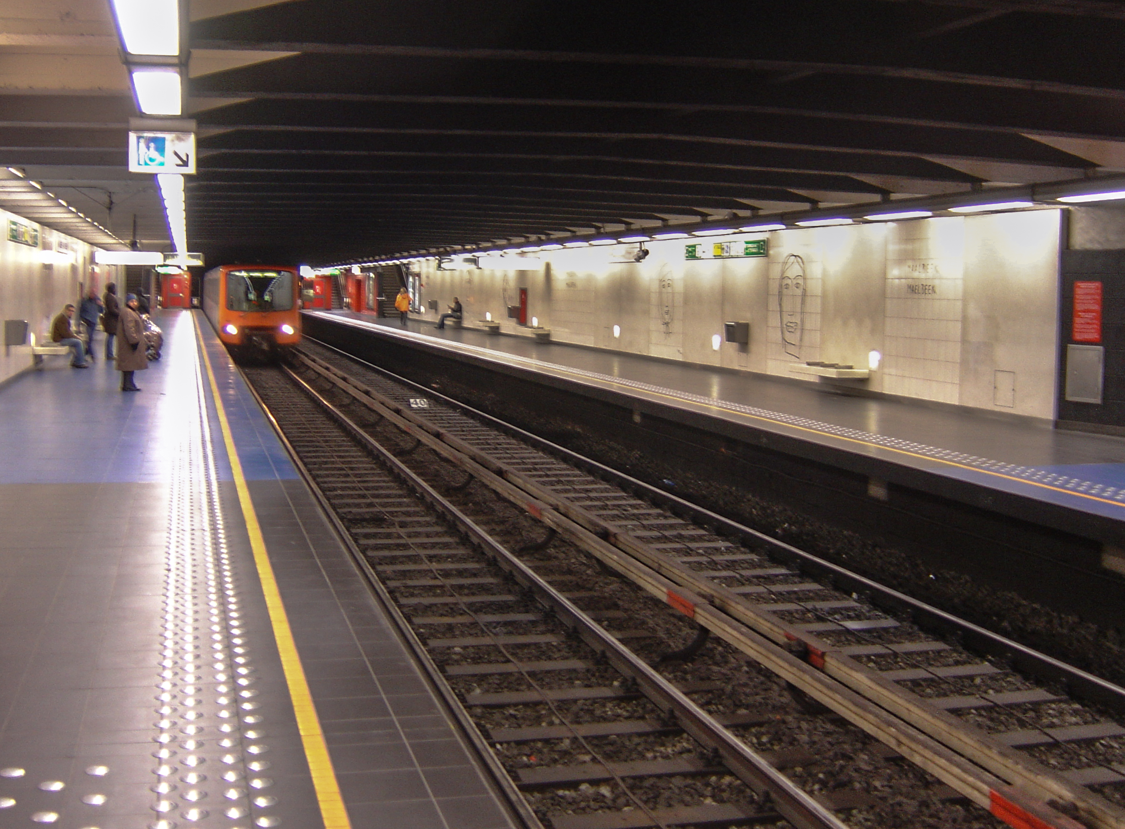 Maelbeek metro station